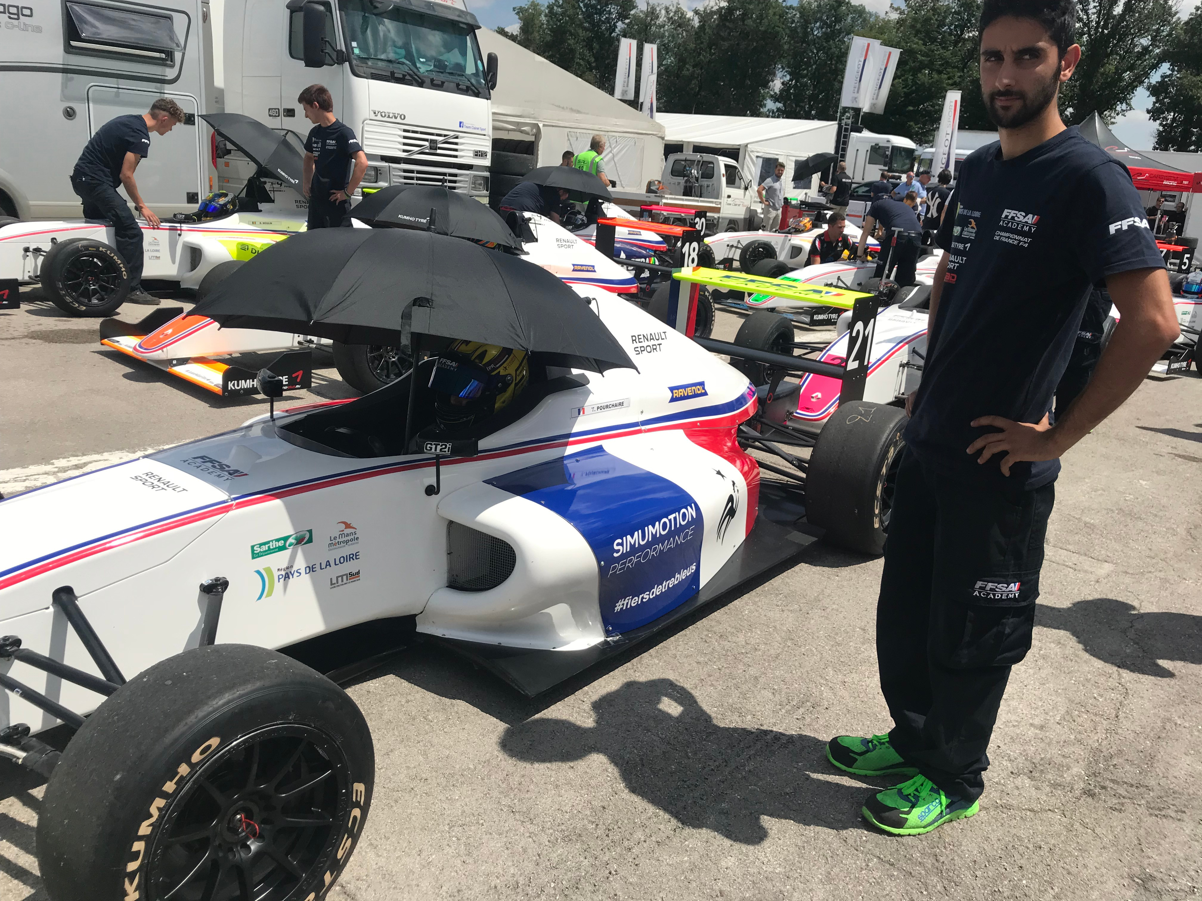 Théo Pourchaire, arborant une livrée spéciale en l'honneur de l'équipe de France de football tout juste championne du monde, pour la manche de Dijon-Prenois en championnat de France de Formule 4 en 2018.